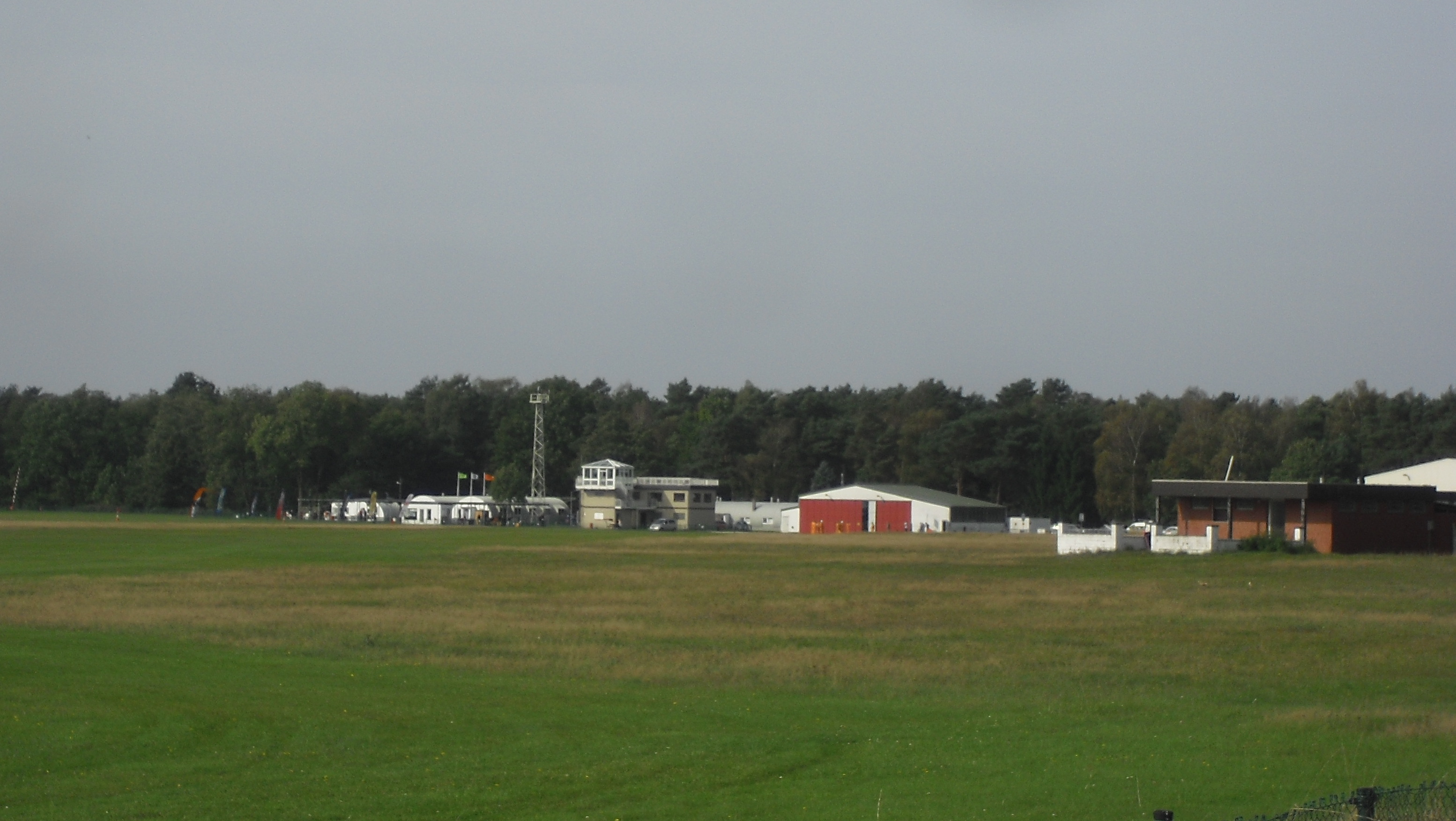 Fliegerhorst Bad Lippspringe